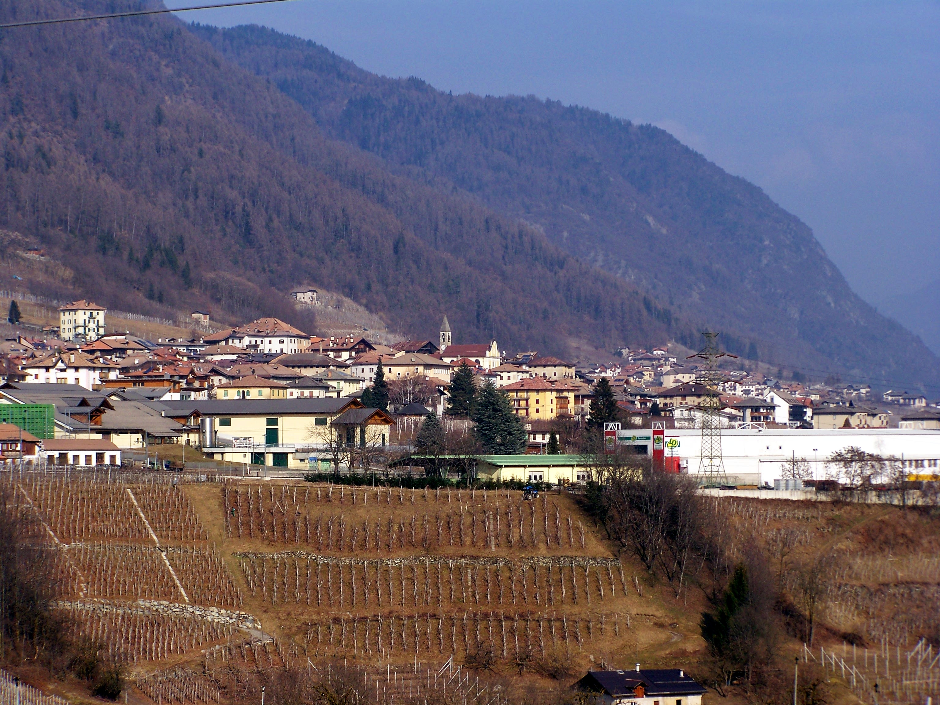 Veduta di Terzolas dalla stazione ferroviaria di Malè.